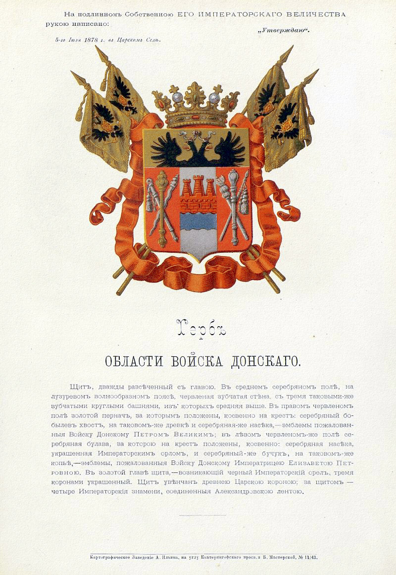 Official Russian Empire coat of arms Don Oblast. Герб Российской Империи Области Войска Донского с официальным описанием в Гербовнике Бенке. Утверждён Императором Всероссийским Александром Вторым в 1878 году.